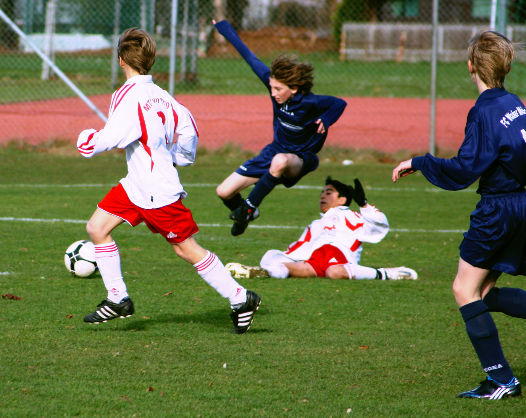 Fußballspiel der D Jugend in München. FC Wacker gegen MTV 1879 München.